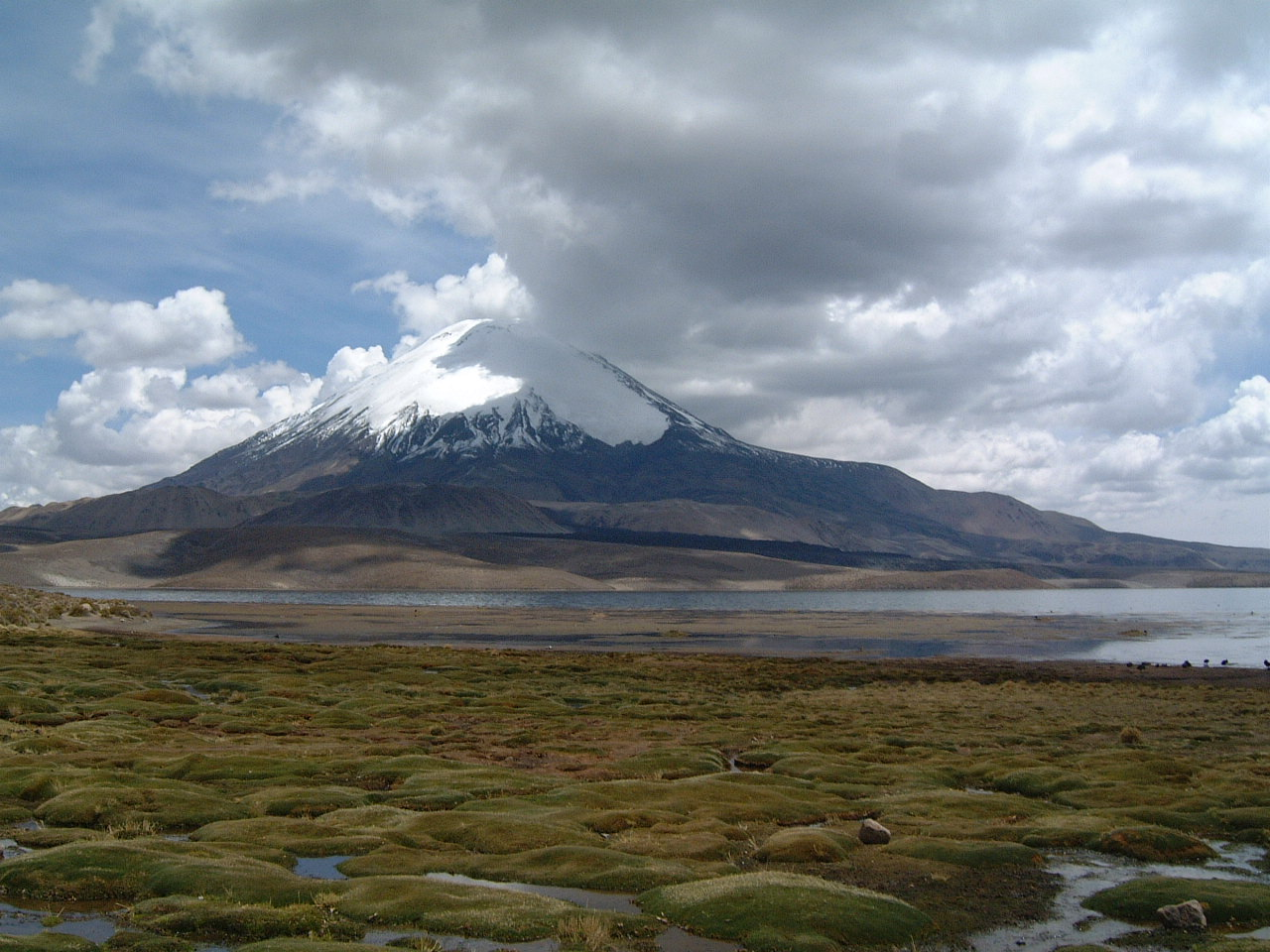 Parinacota volcano and Lake Chungará By Herman Luyken